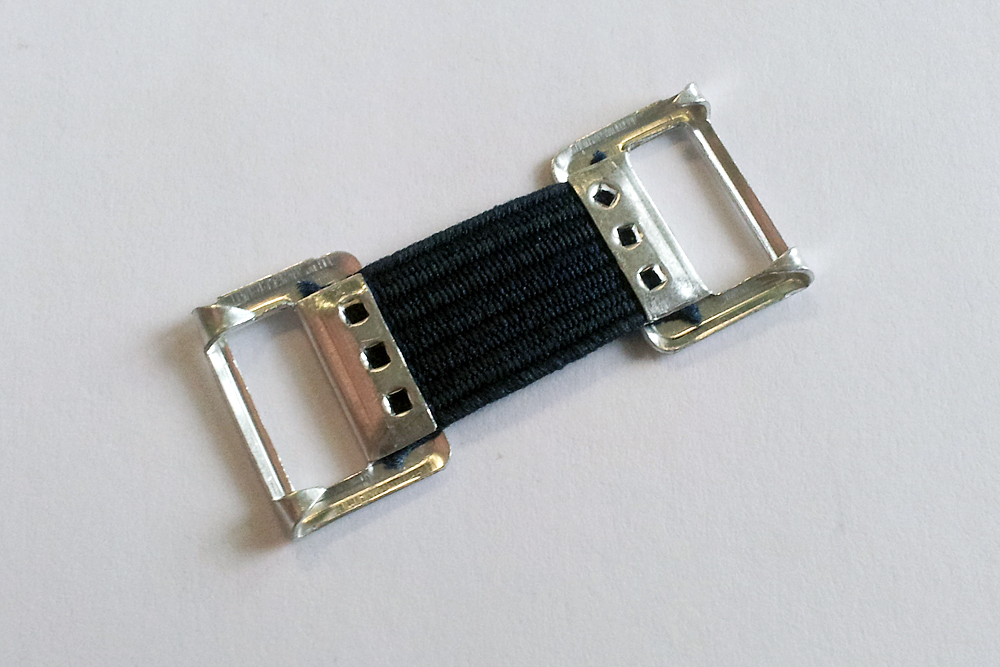 Verbandsklammer